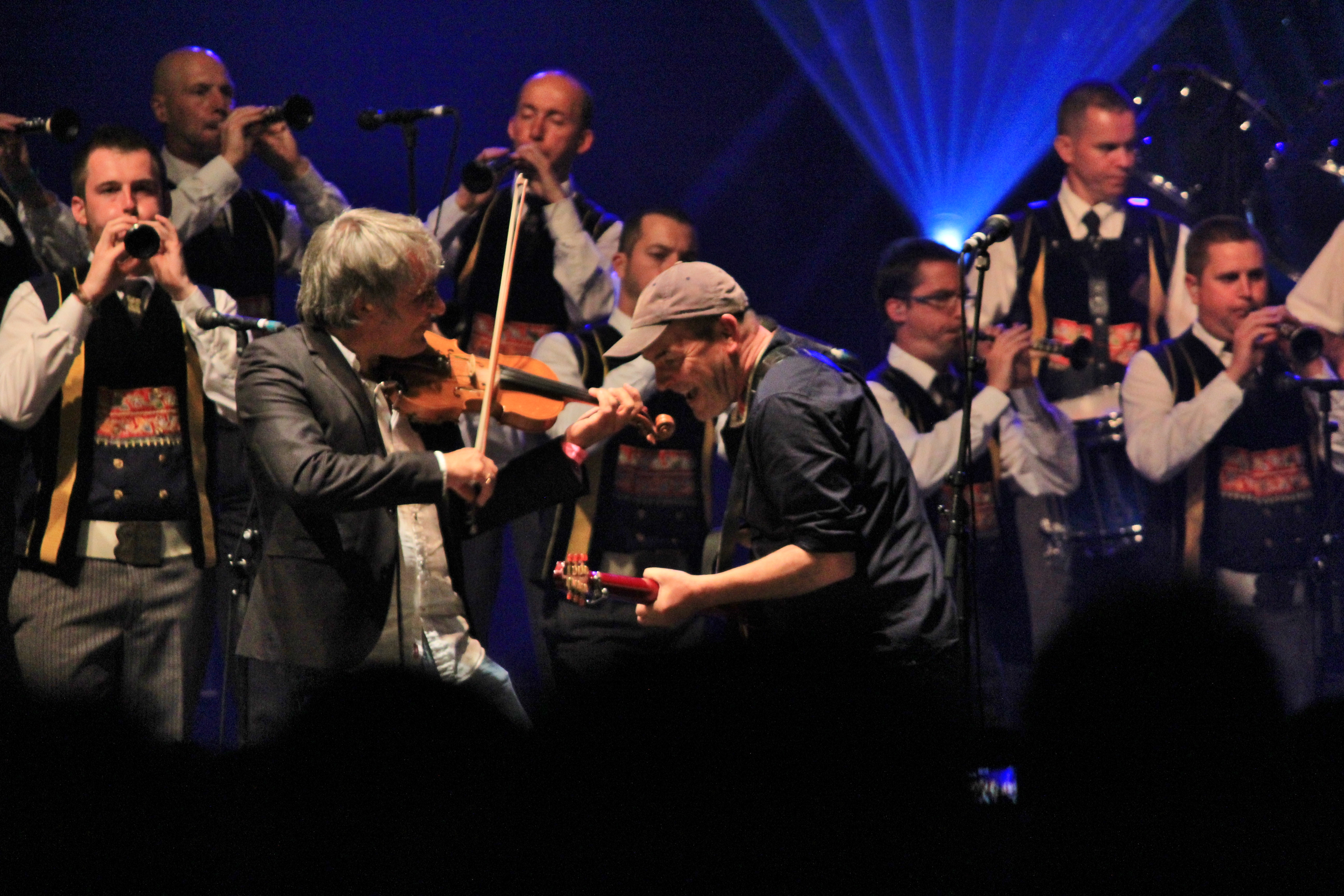 Concert de Red Cardell et du Bagad Kemper lors du festival interceltique de Lorient.